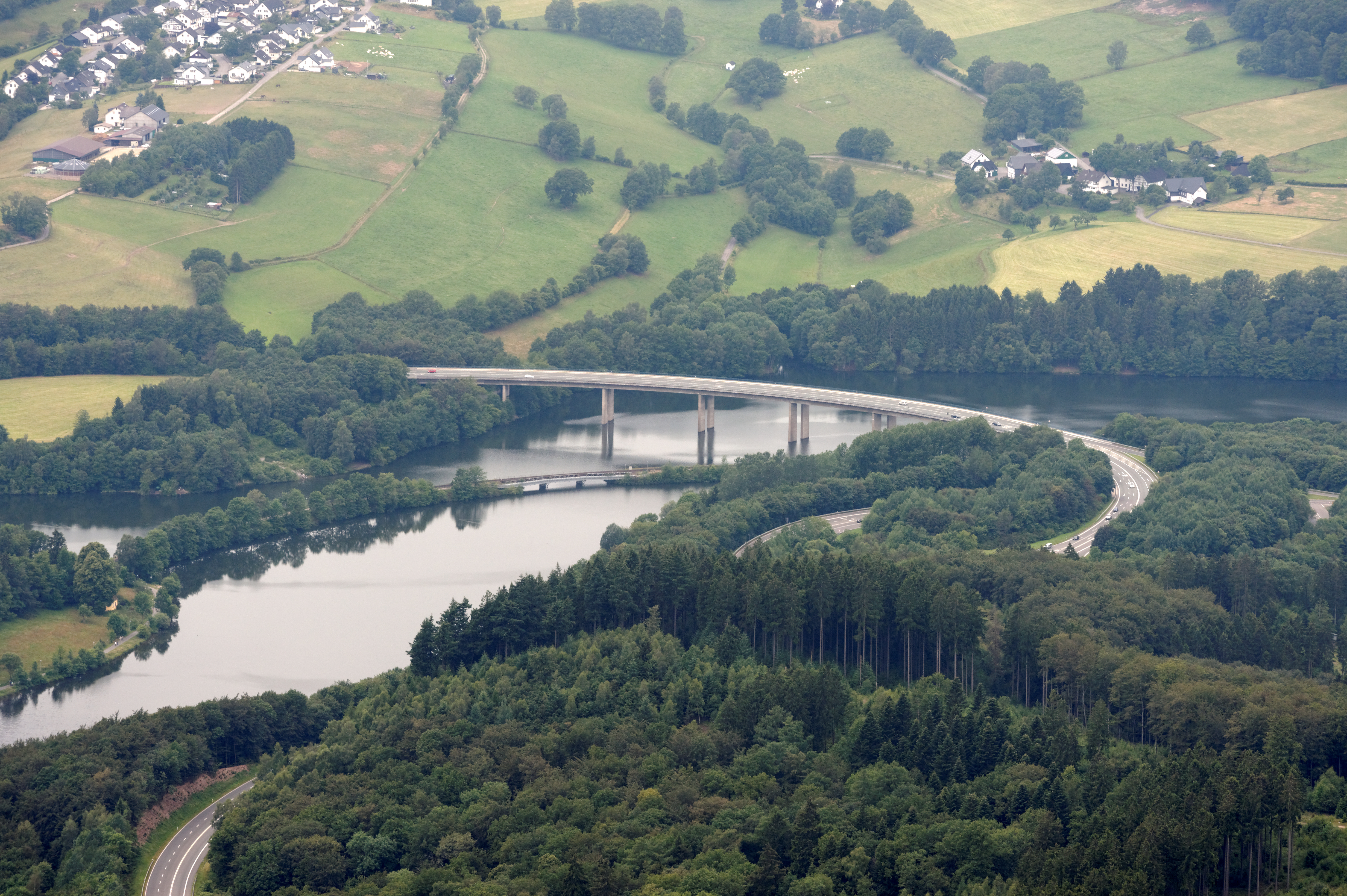 Fotoflug Sauerland Nord. Olpe: Bigge-Vorsperre der Biggetalsperre mit Brücke der Bundesstraße 55, Damm und Brücke der Bahnstrecke Finnentrop–Freudenberg (Biggetalbahn), oben links Drolshagen-Frenkhausen, oben rechts Alperscheid, Blickrichtung West The making of this document was supported by the Community-Budget of Wikimedia Germany.